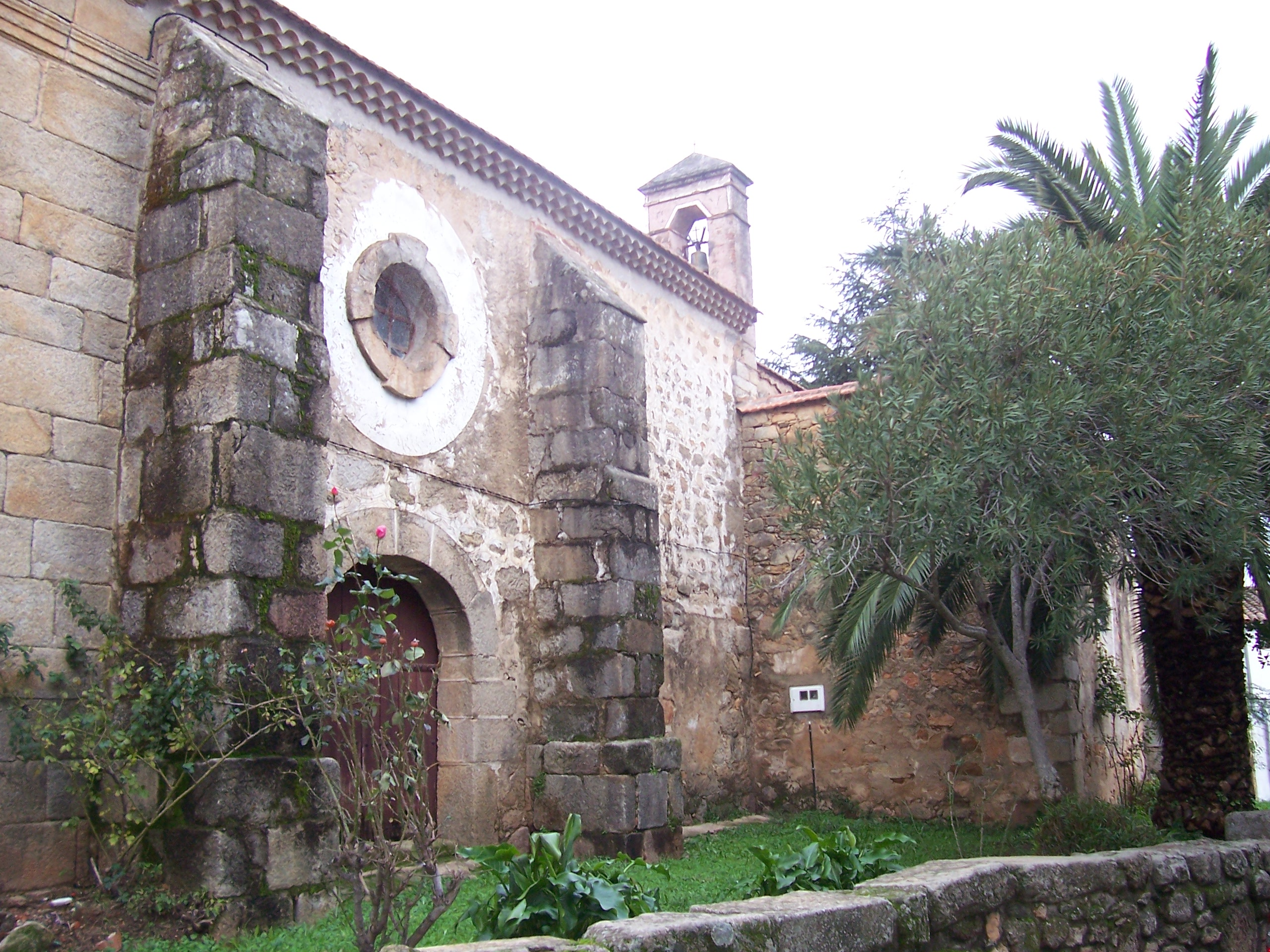 Iglesia de Villasbuenas de Gata, provincia de Cáceres, España.